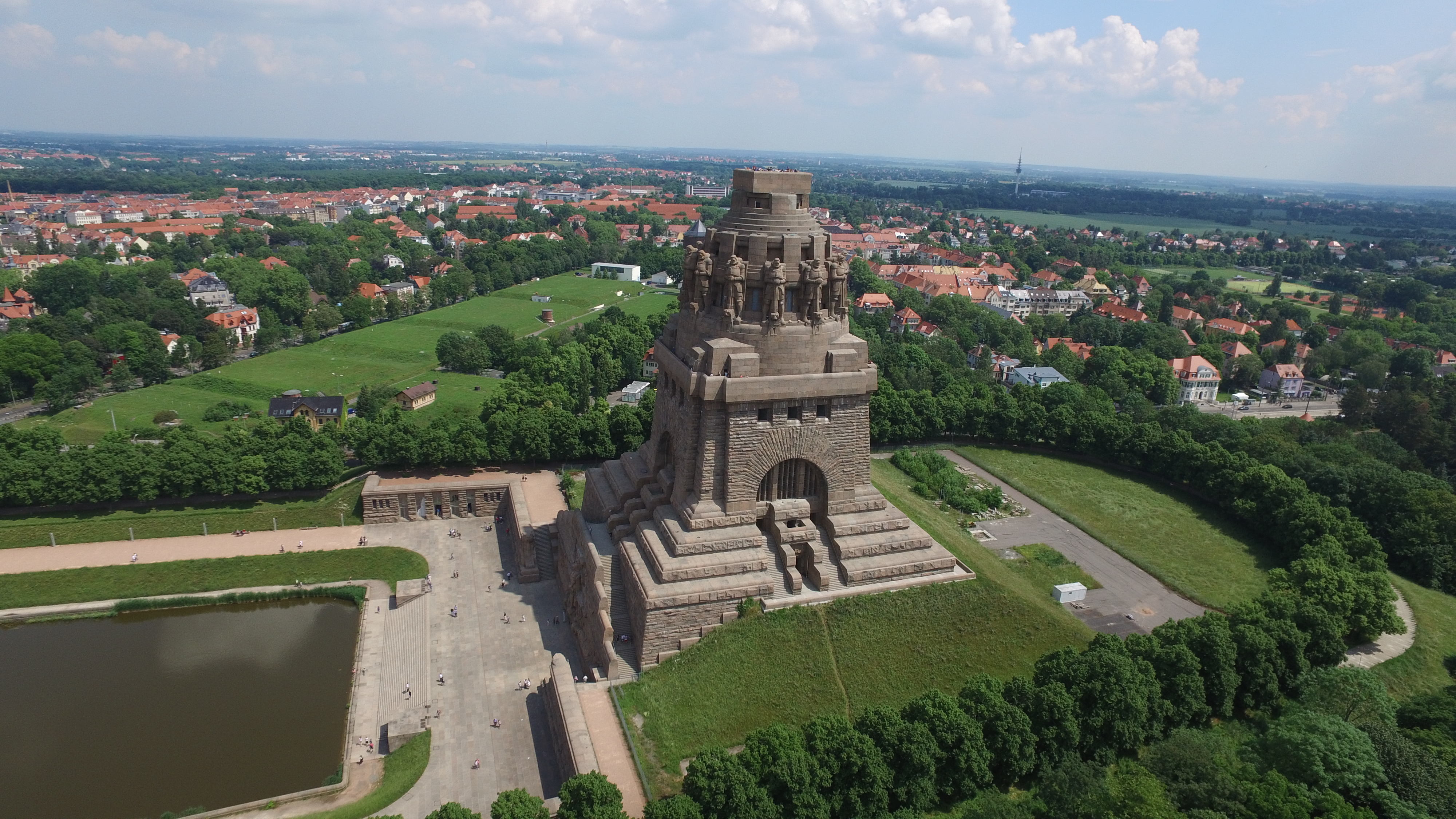 Völkerschlachtdenkmal Leipzig